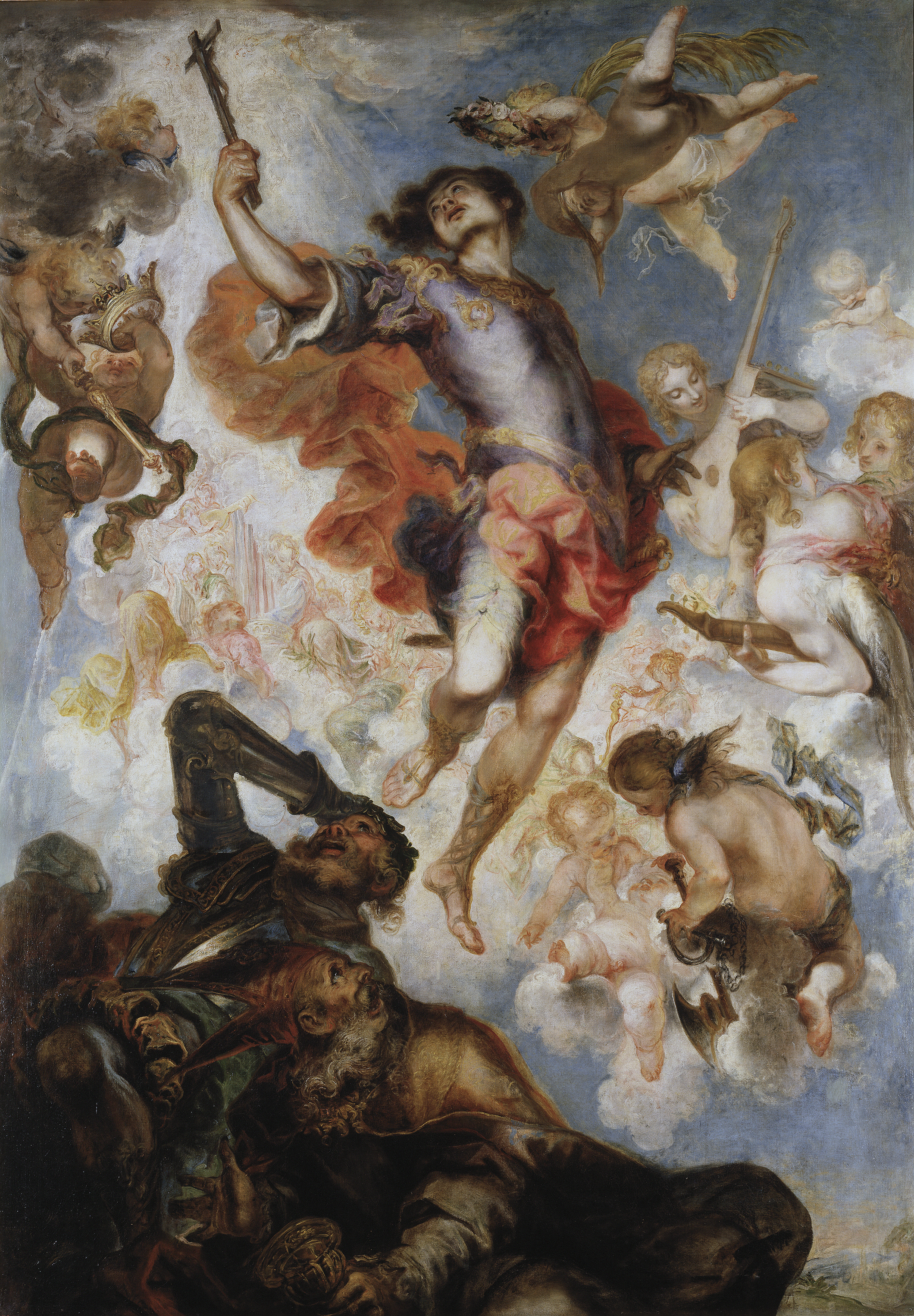 La obra representa el triunfo del mártir cristiano San Hermenegildo y la victoria del catolicismo sobre el arrianismo.